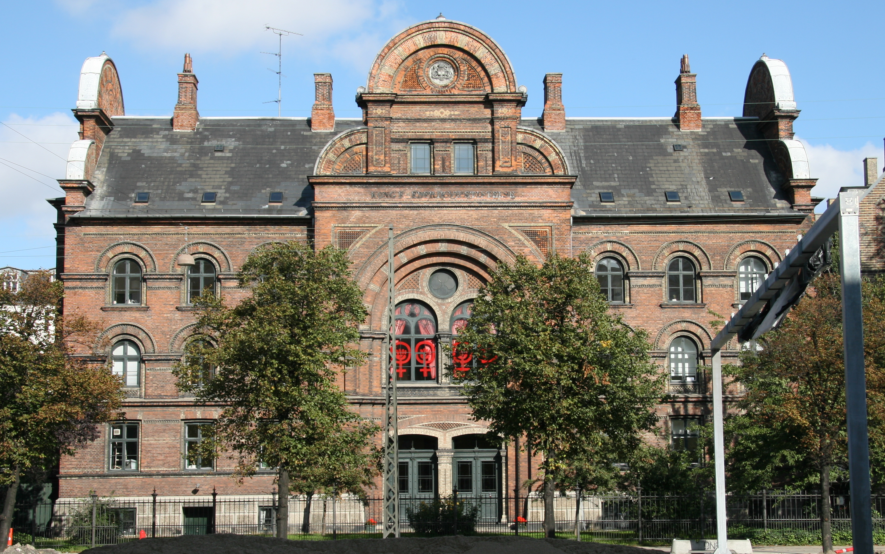 Dannerhuset, Copenhagen, Denmark.